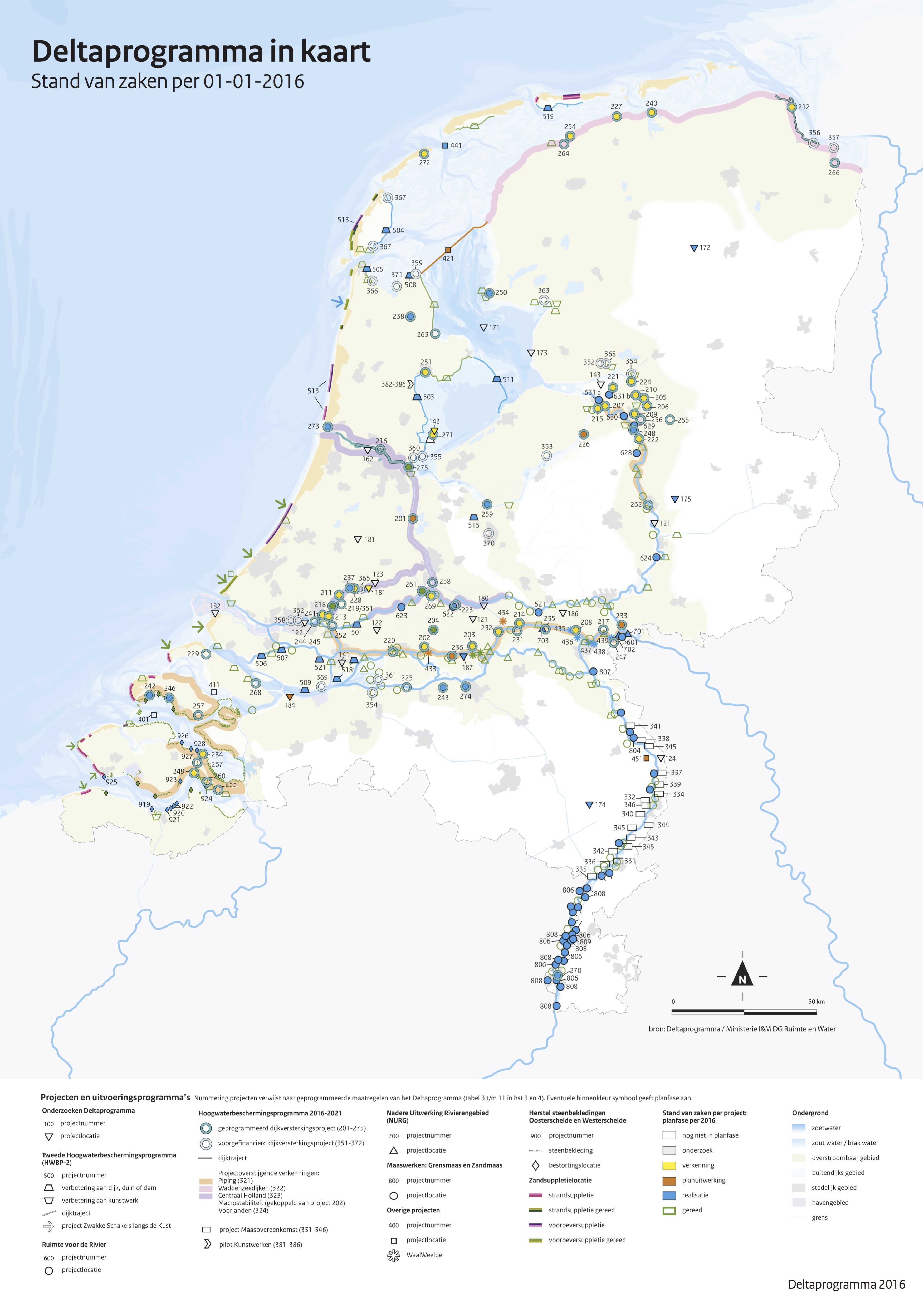 DP2016 Kaart 1 Deltaprogramma in Kaart Stand van zaken per 1-1-2016